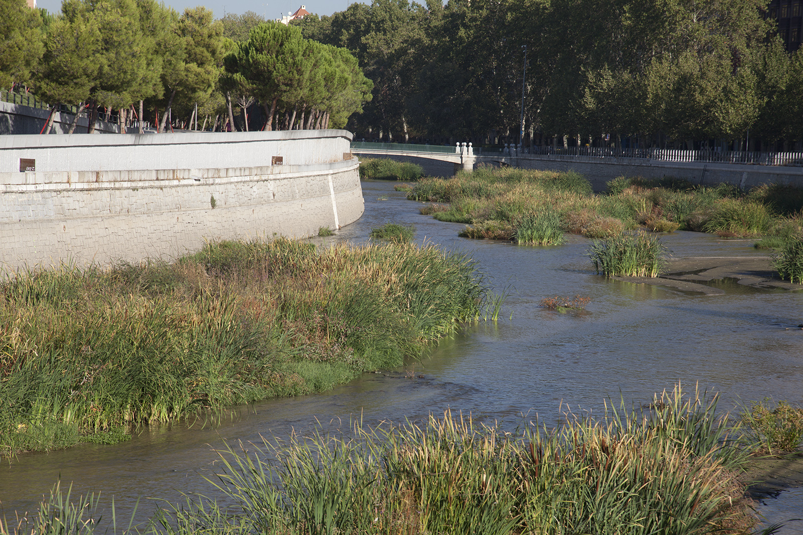 “La ciudad de Madrid está recuperando prestigio internacional. No sé si somos del todo conscientes del gran momento que vive nuestra ciudad, del dinamismo que empieza a notarse”. Luis Cueto, coordinador general de Alcaldía, ha hecho esta afirmación antes de viajar a Boston para participar en la European Conference que anualmente organiza la universidad americana y que en esta edición tiene como protagonistas a Madrid y Barcelona. “Algunos de los augurios desfavorables vertidos cuando llegamos al poder se han demostrado falsos”, aseguró Cueto. “Estamos demostrando que es posible abrir la puerta a la participación, a una mayor implicación ciudadana en los temas que les afectan directamente sin perder nunca de vista la proyección internacional y una visión de ciudad de largo recorrido”.